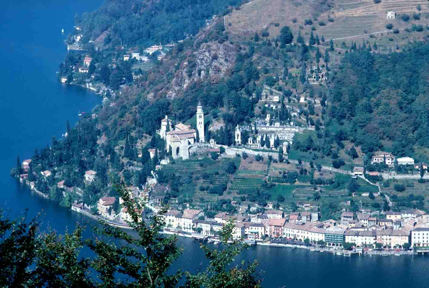 Morcoto (Kreis Carona, Bezirk Lugano, Kanton Tessin, Schweiz) mit Monte Arbòstora